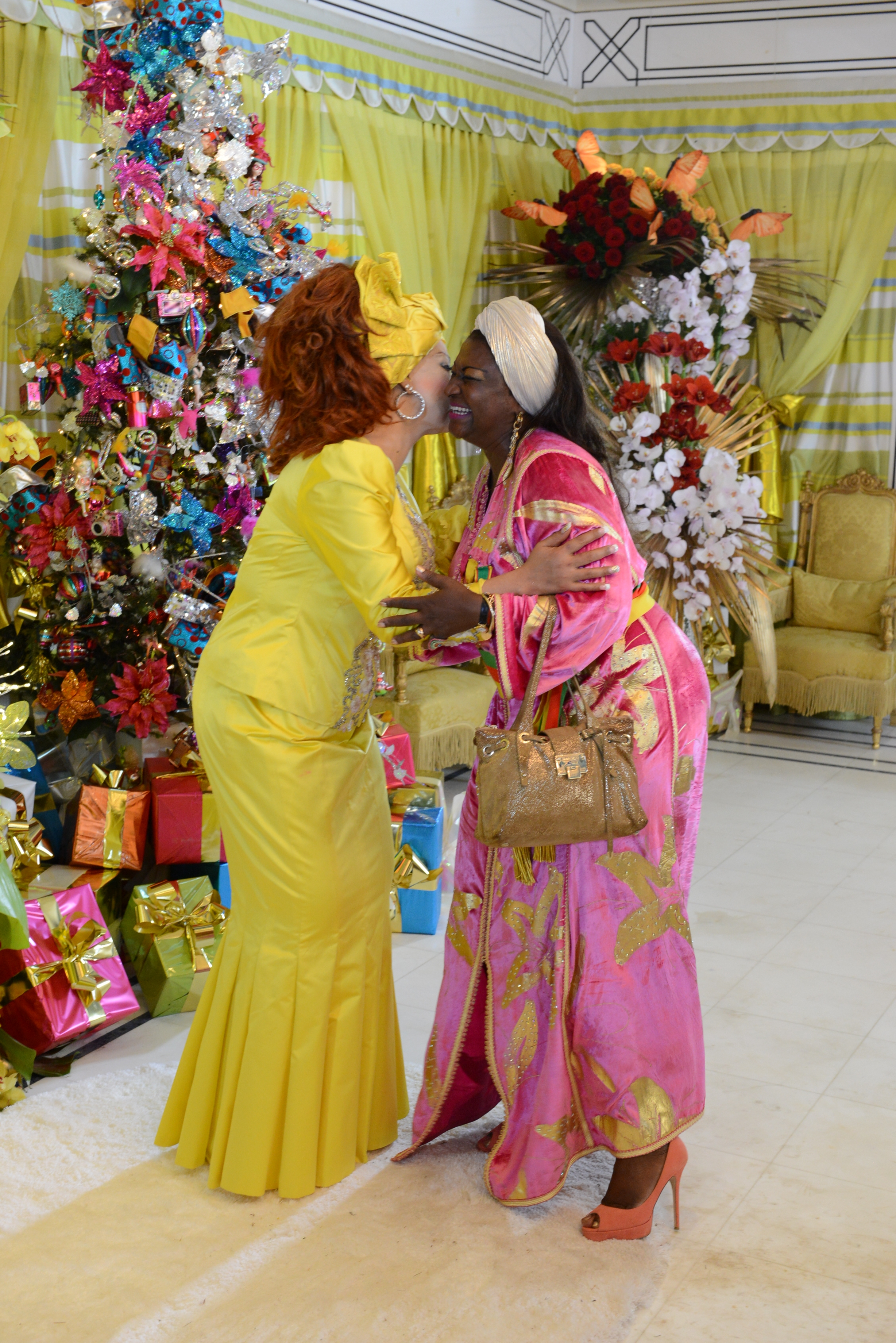 Présentation des voeux à Mme Chantal Biya